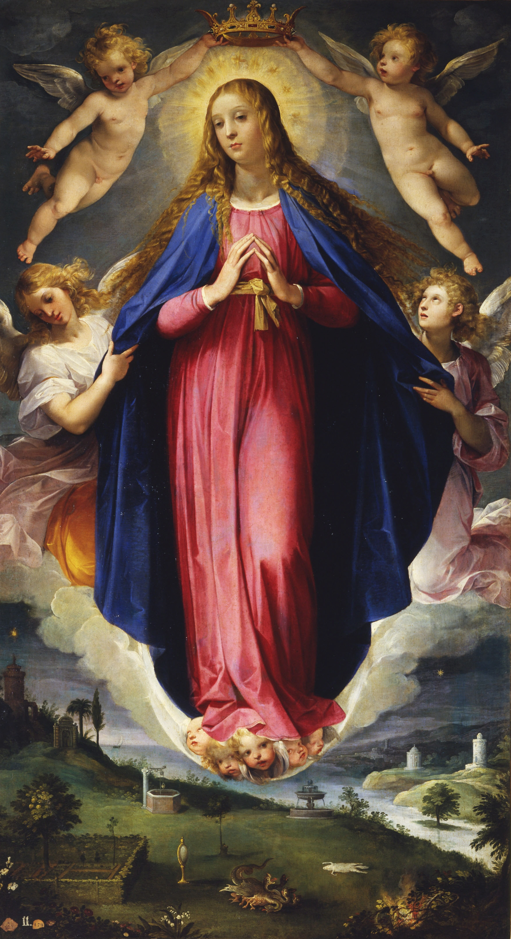 La obra representa la Inmaculada Concepción de la Virgen María, madre de Jesucristo.